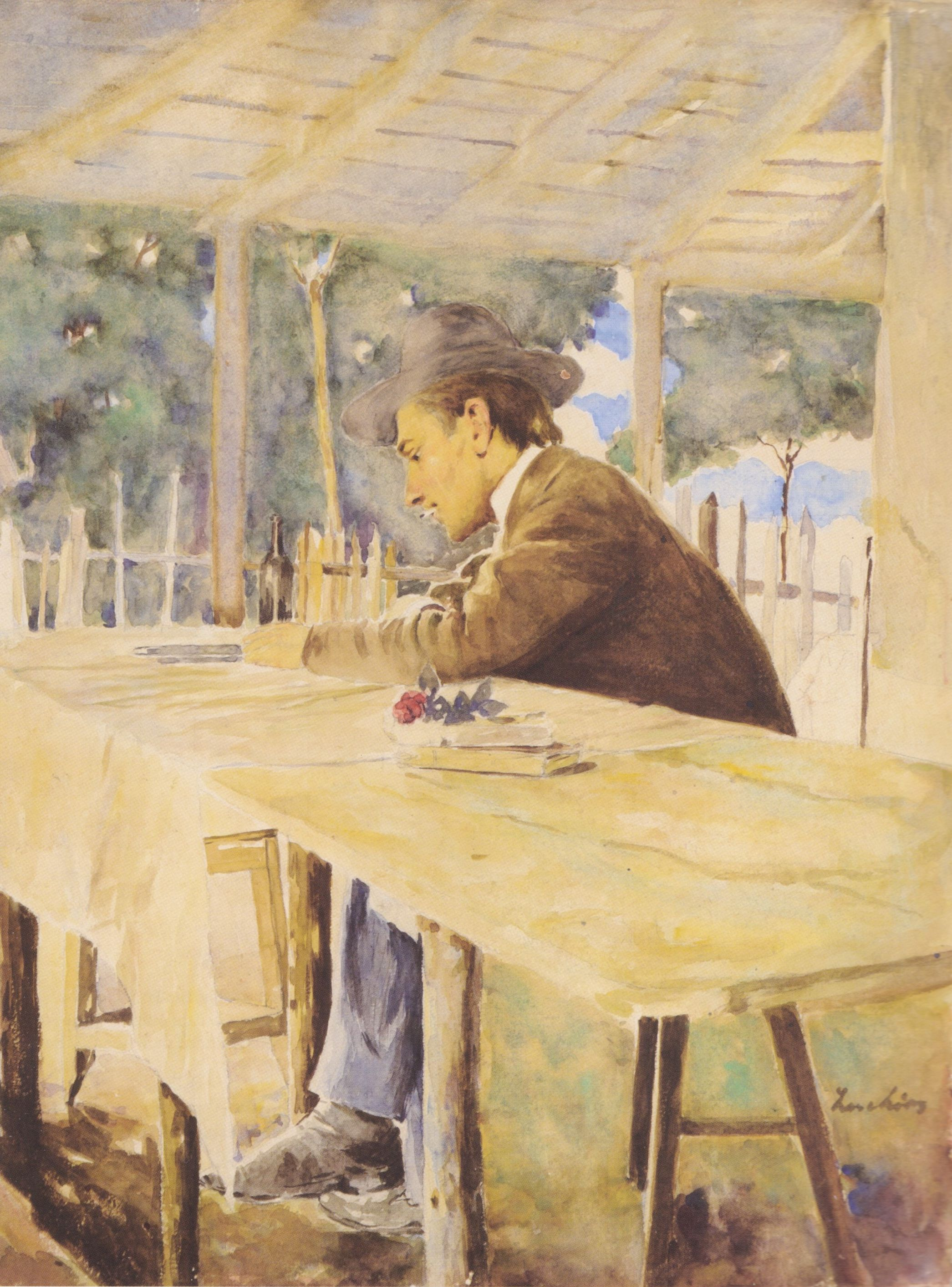 Autoportret în grădină, acuarelă pe hârtie, 0,445 x 0,348 m, semnat dreapta jos cu brun Luchian - Colecția M. Ormolu, Grigore Iliescu, Achiziție 1972 - MNAR, Cabinetul de Desene și Gravuri, inv. 80712/10480